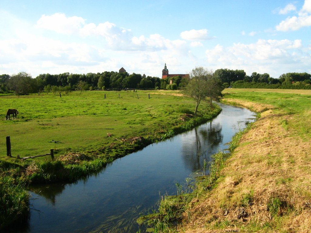 Blick von Süden über die Dosse auf Wittstock (Landkreis Ostprignitz-Ruppin, Brandenburg).